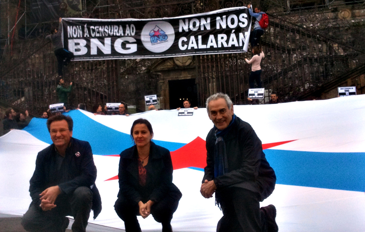 Movilización do BNG ante a catedral de Santiago de Compostela pola súa exclusión da RTVG nos espazos electorais das europeas de 2014. De esquerda da dereita, Xavier Vence, Ana Miranda e Camilo Nogueira.